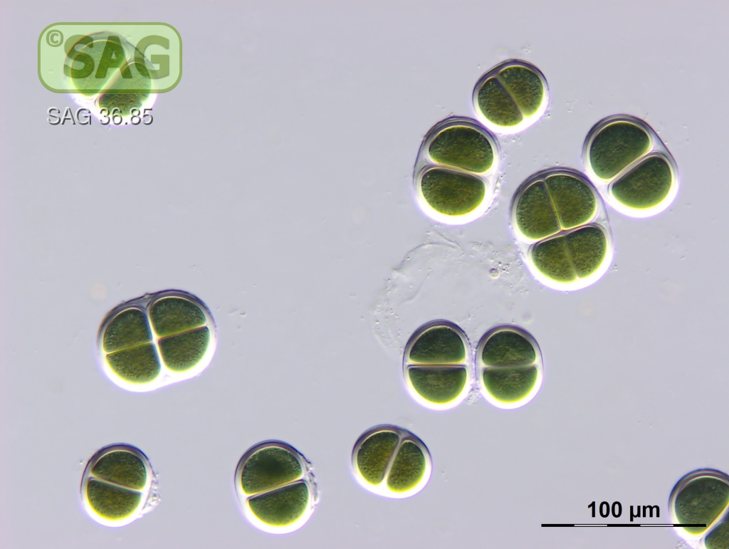 Chroococcus turgidus